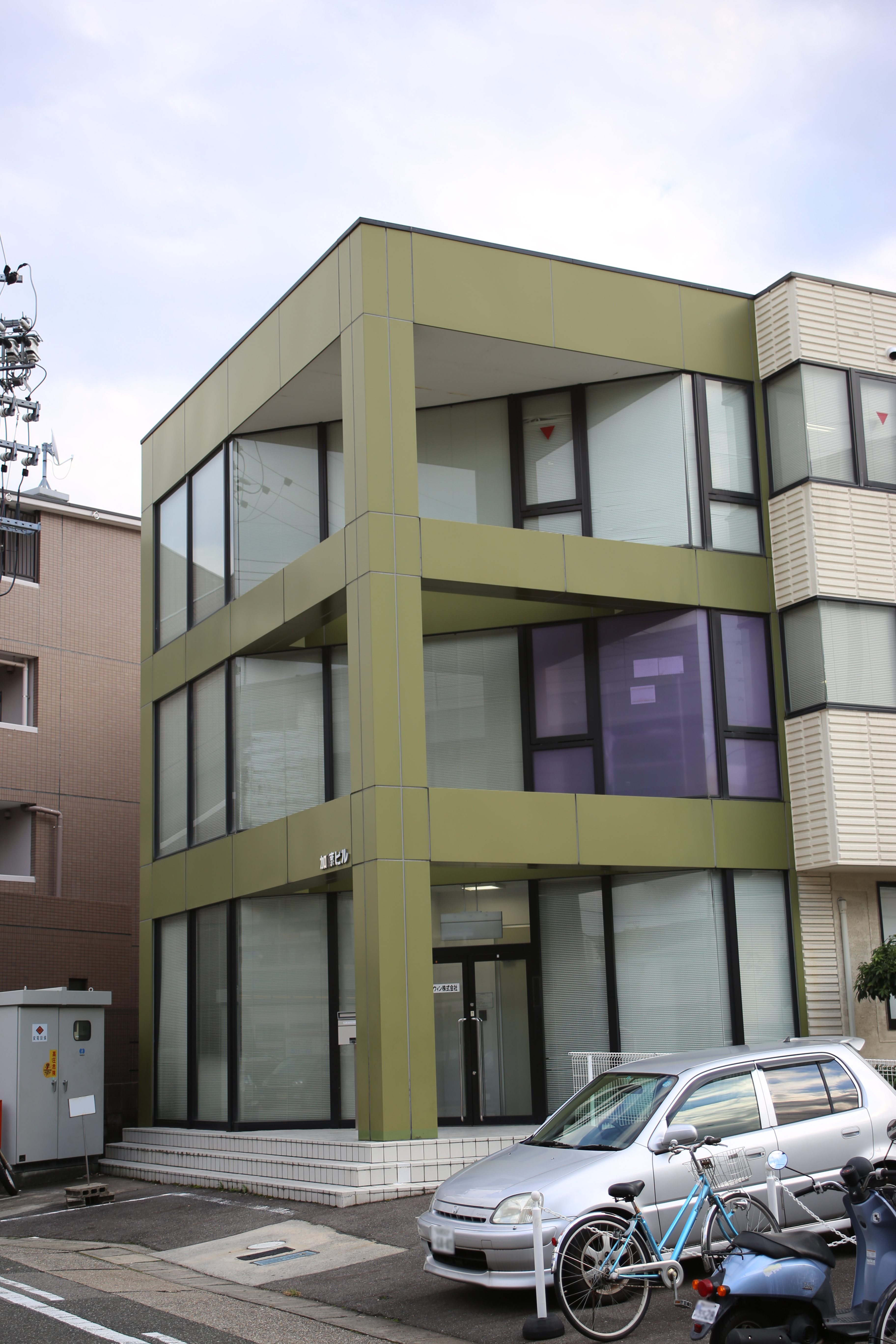 名古屋市名東区上社のポールトゥウィン本社が入居する加藤ビルを北側公道西側より撮影